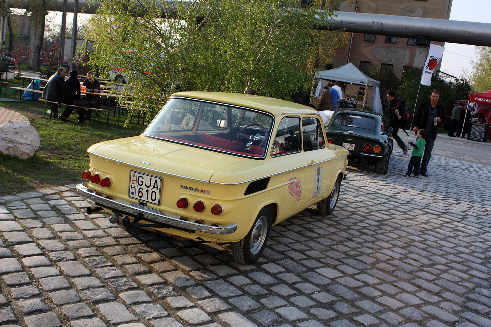 Beige NSU Prinz 1000 C.